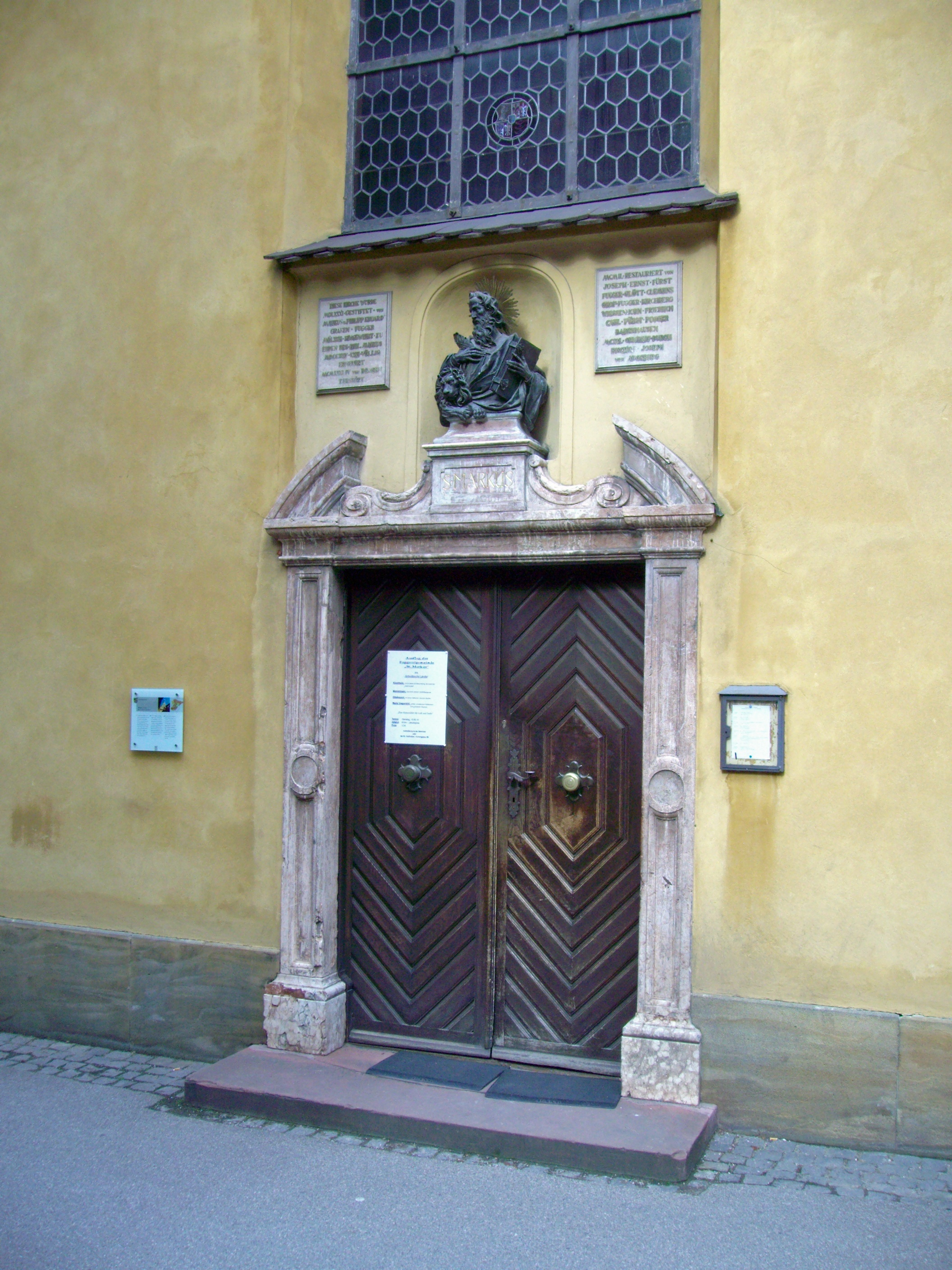 Eingang der Markuskirche in der Fuggerei, Augsburg